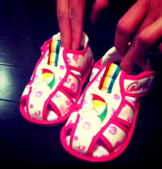 アーノルドパーマー DAI-AP4105 103ピンク The Umbrella Story